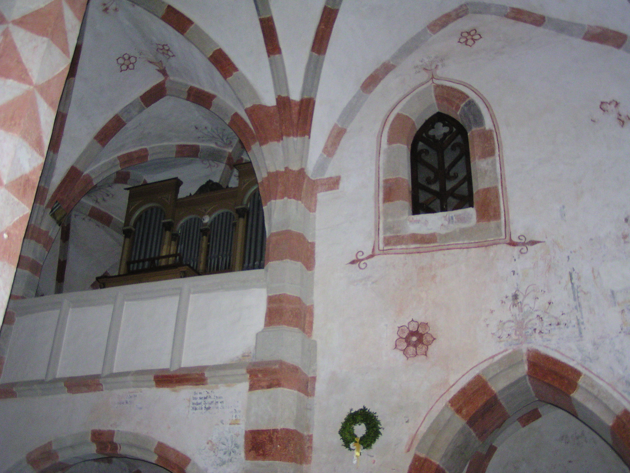 podzim 2011